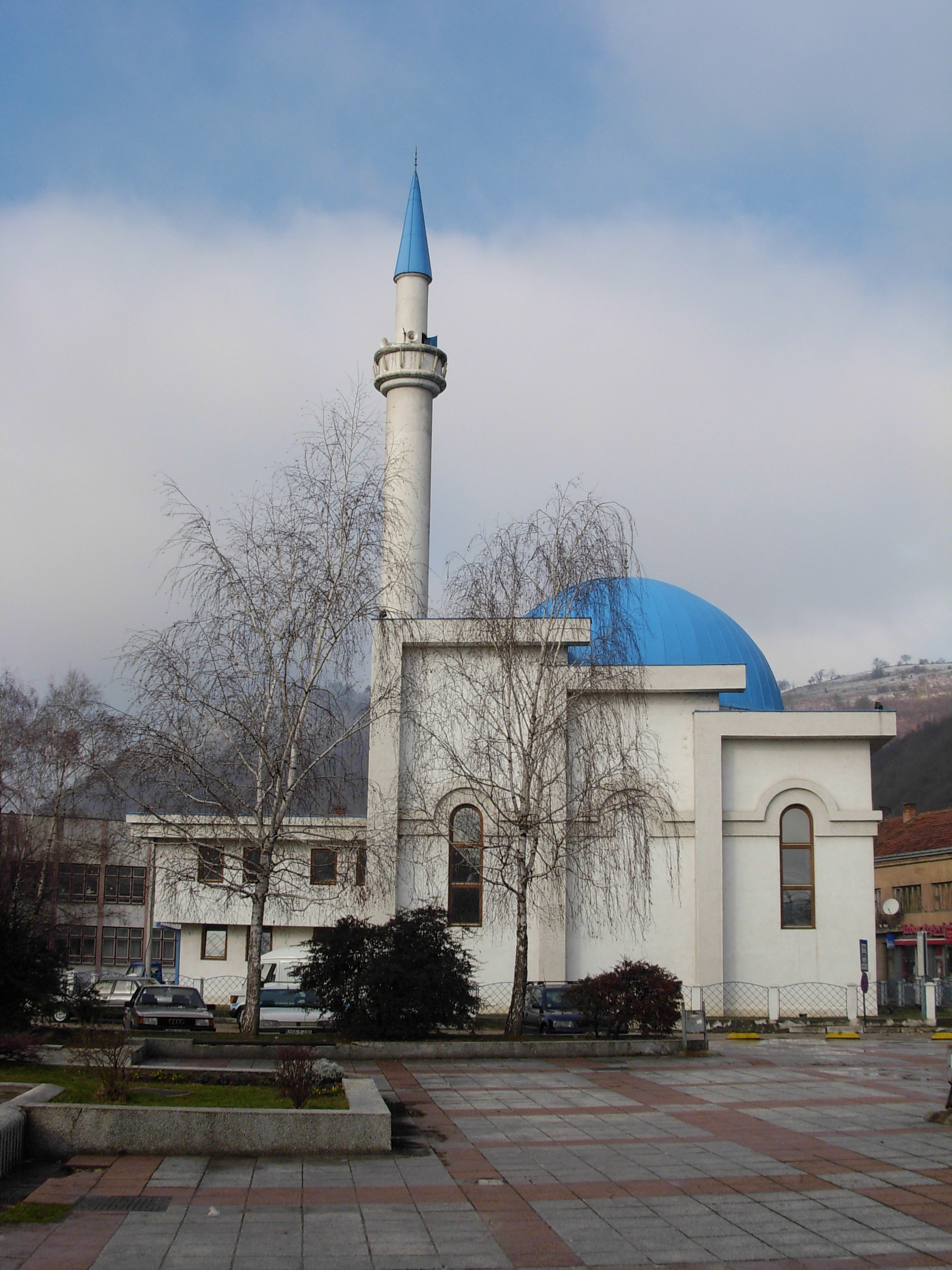 Džamija u Donjem Vakufu.